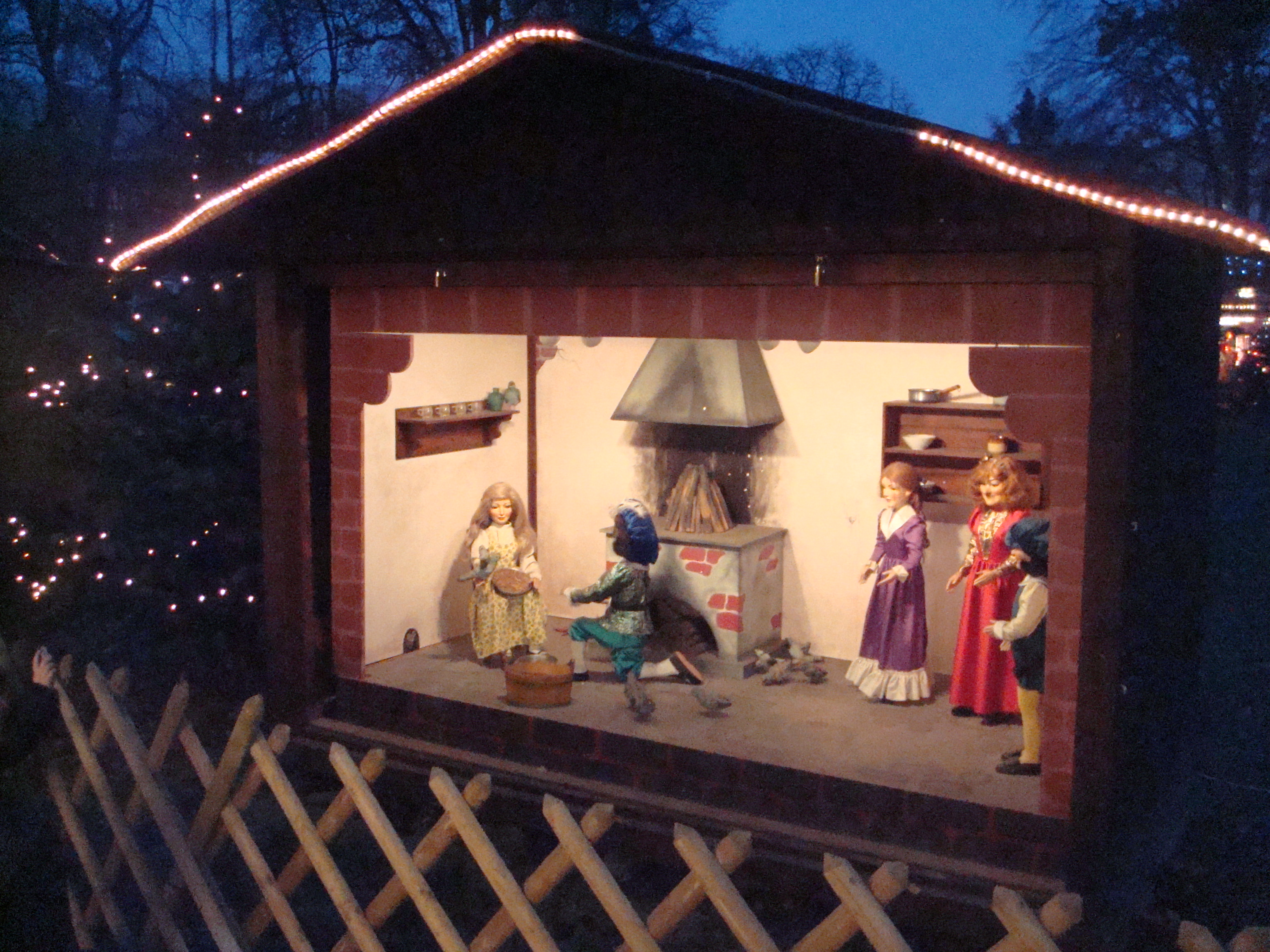 Weihnachtsmarkt Volksgarten Linz Märchenhaus Aschenputtel